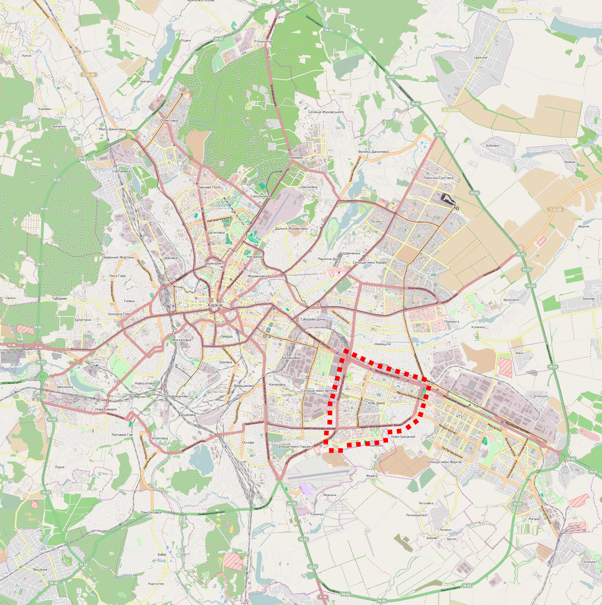 Приблизні межі Нових Будинків на загальній мапі Харкова (можуть дещо варіюватися).